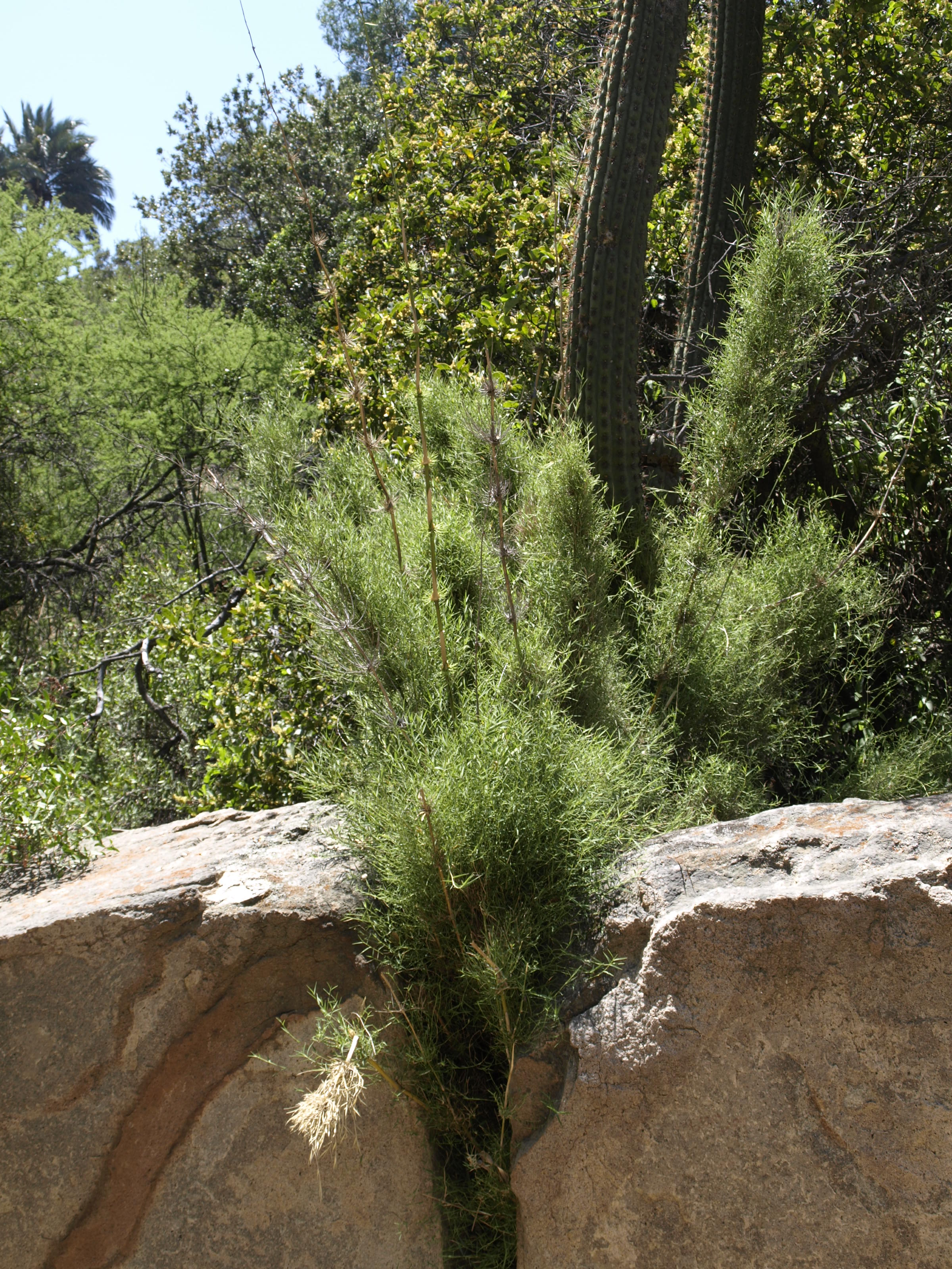 Parque Nacional La Campana, Chile.